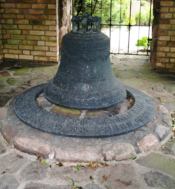 Glocke